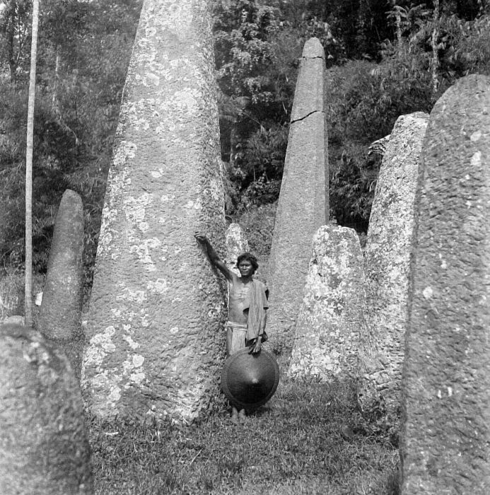 Negatief. Monolithen in Toraja